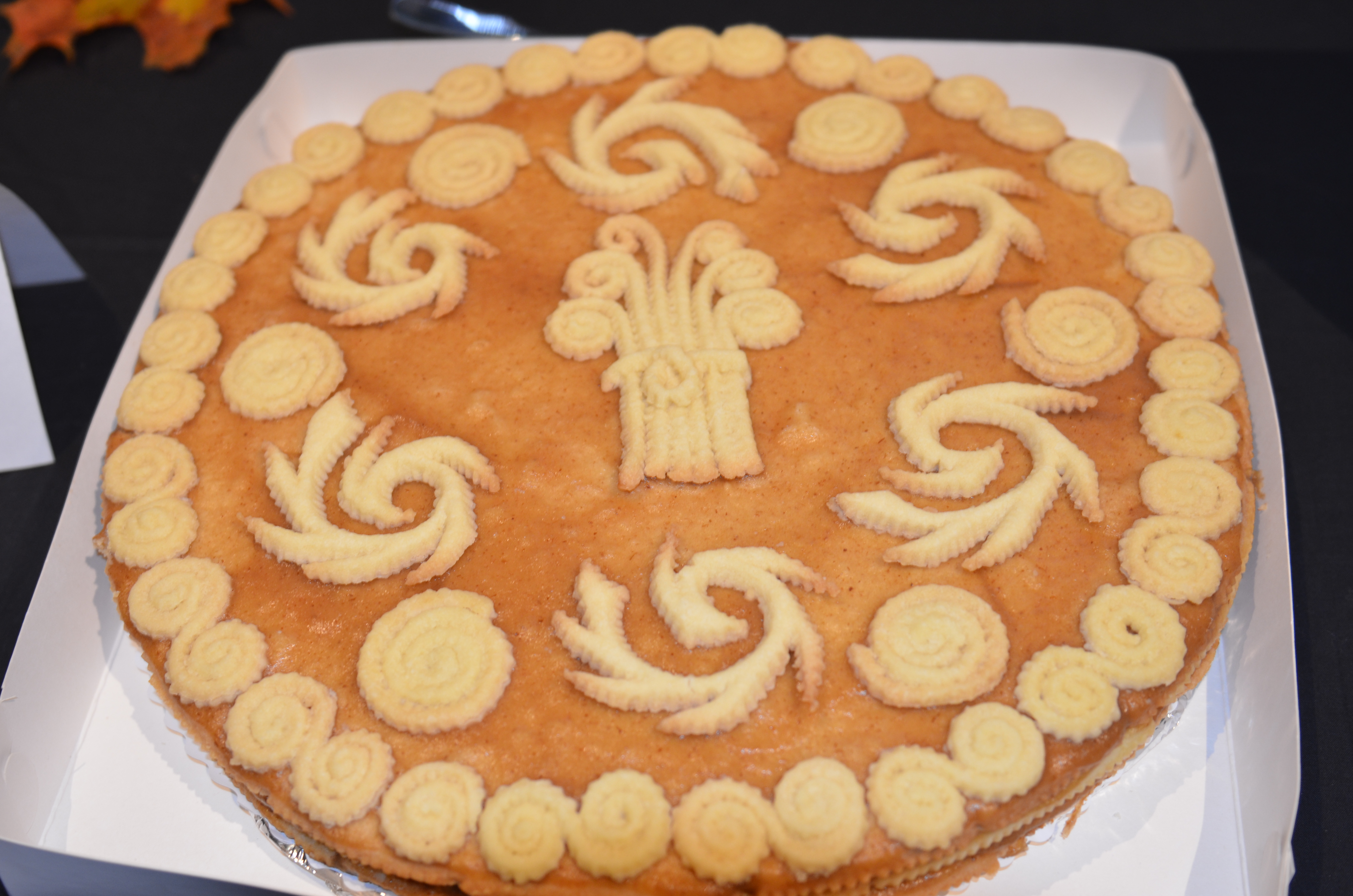 Tårta ifrån Sorunda socken